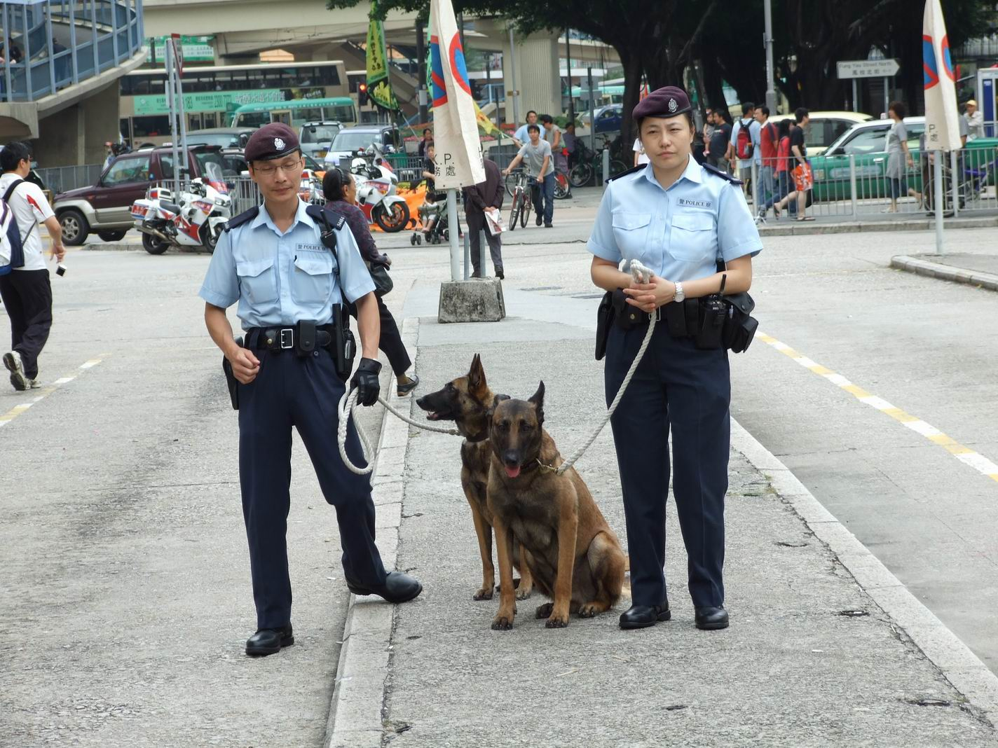 中文（香港）: 香港警務處警犬隊